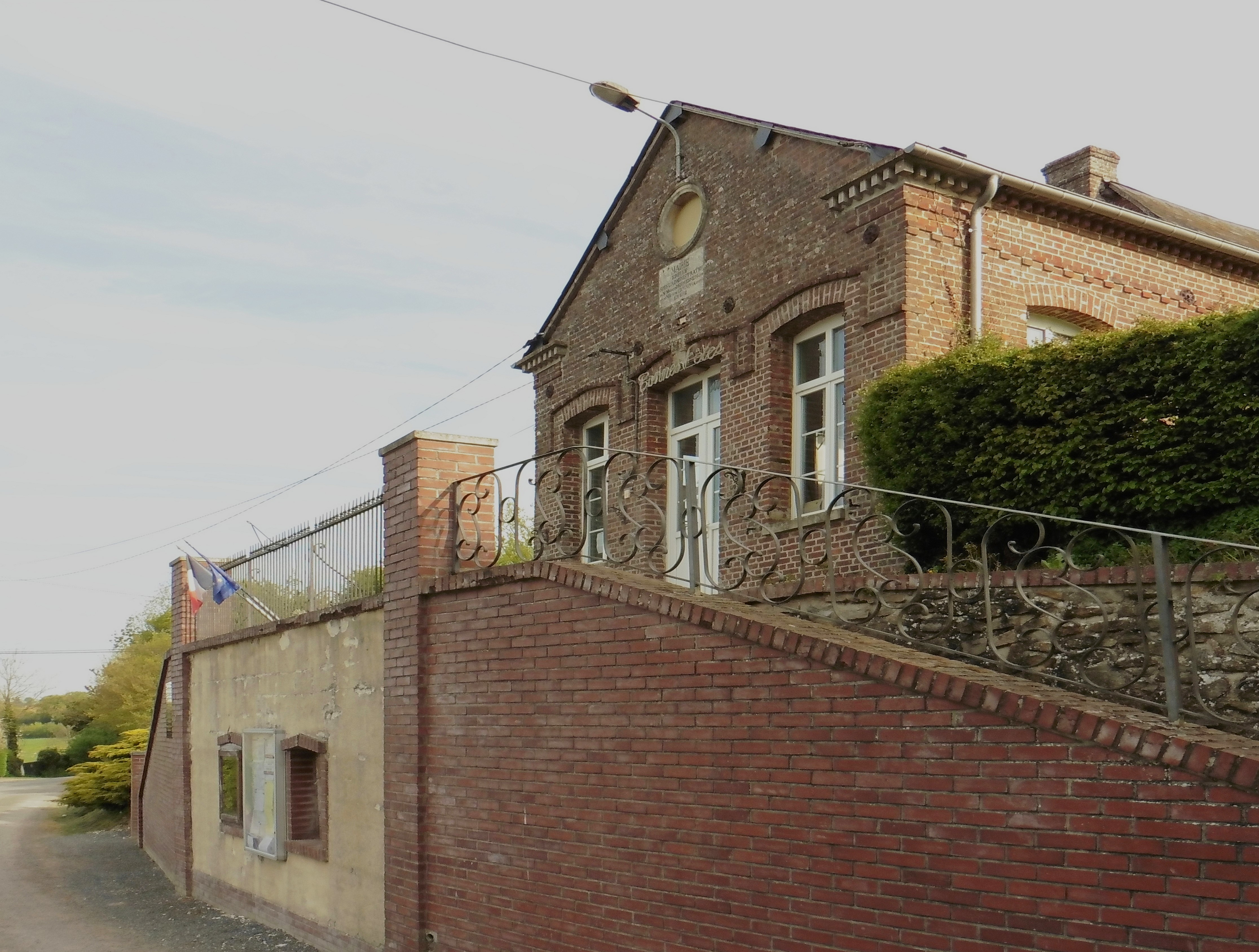 La mairie d' Héricourt-sur-Thérain village de Picardie France